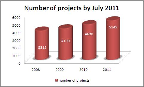 nombre de projets de la base de donnée du wsis stocktaking